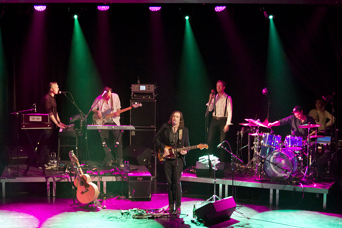 Det danske band The William Blakes på Bremen Teater 12. januar 2013